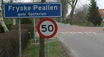 Fryske Peallen, gemeente Opsterlân